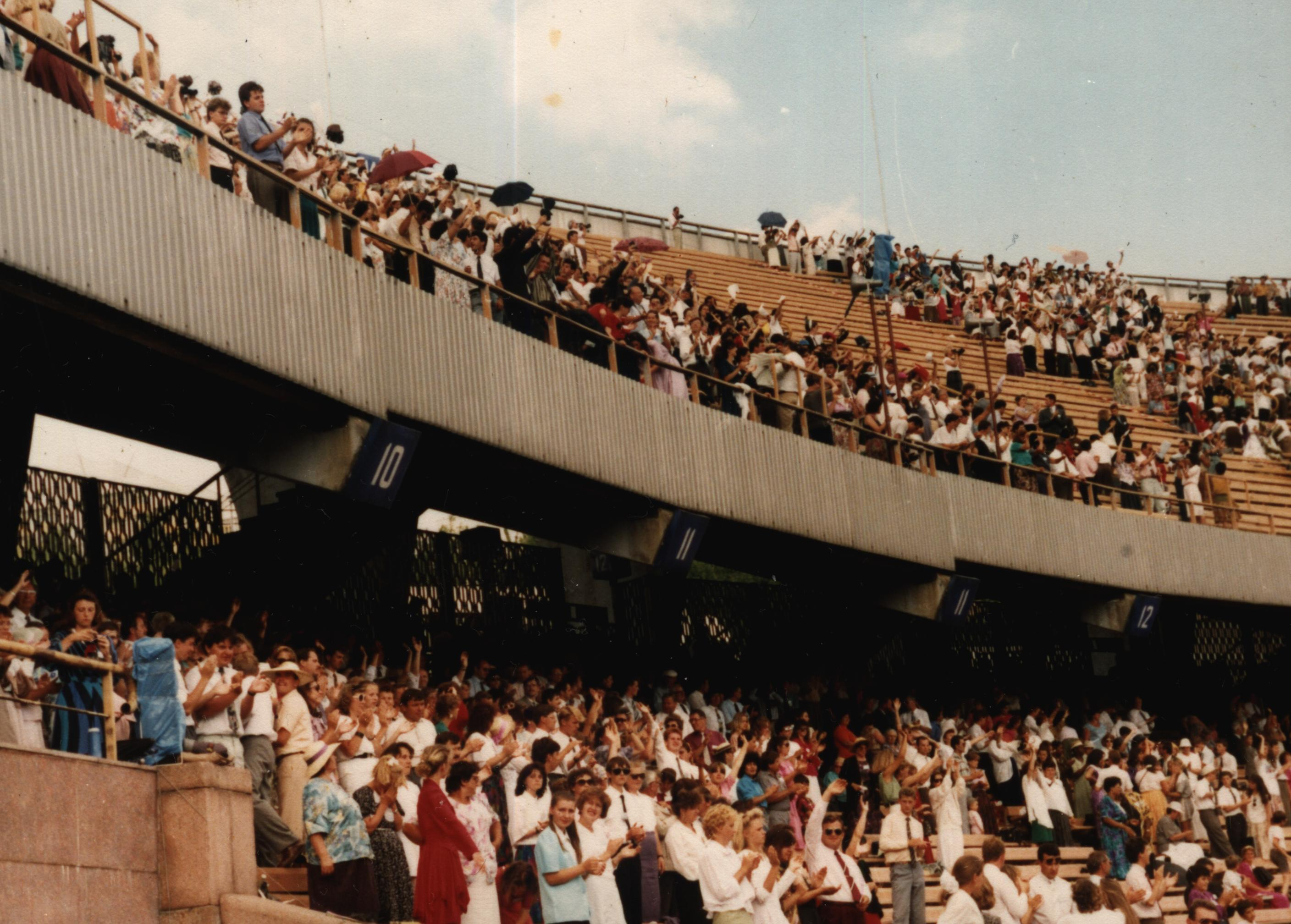 Zgromadzenie międzynarodowe Świadków Jehowy na Ukrainie w Kijowie w 1993 roku.